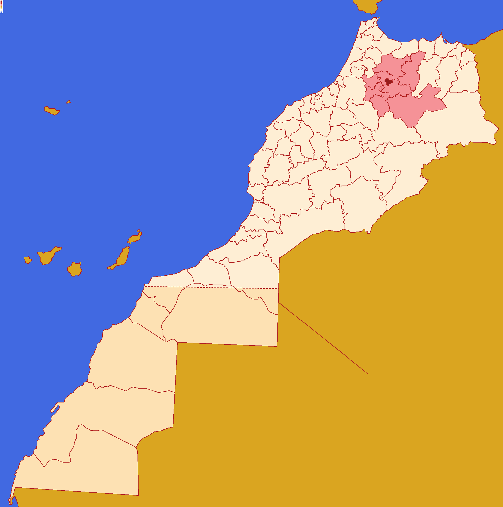 Localização da prefeitura de Fez ,dentro da região de Fez-Meknès e dentro de Marrocos.Conforme a reforma administrativa de 2015.